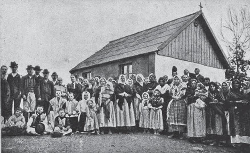 Српски (ћирилица): Први пољски досељеници у село Челиновац код Градишке.